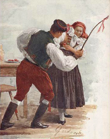 М. Гардавска. Моравские типы, 1910-е гг. Поливальный понедельник.